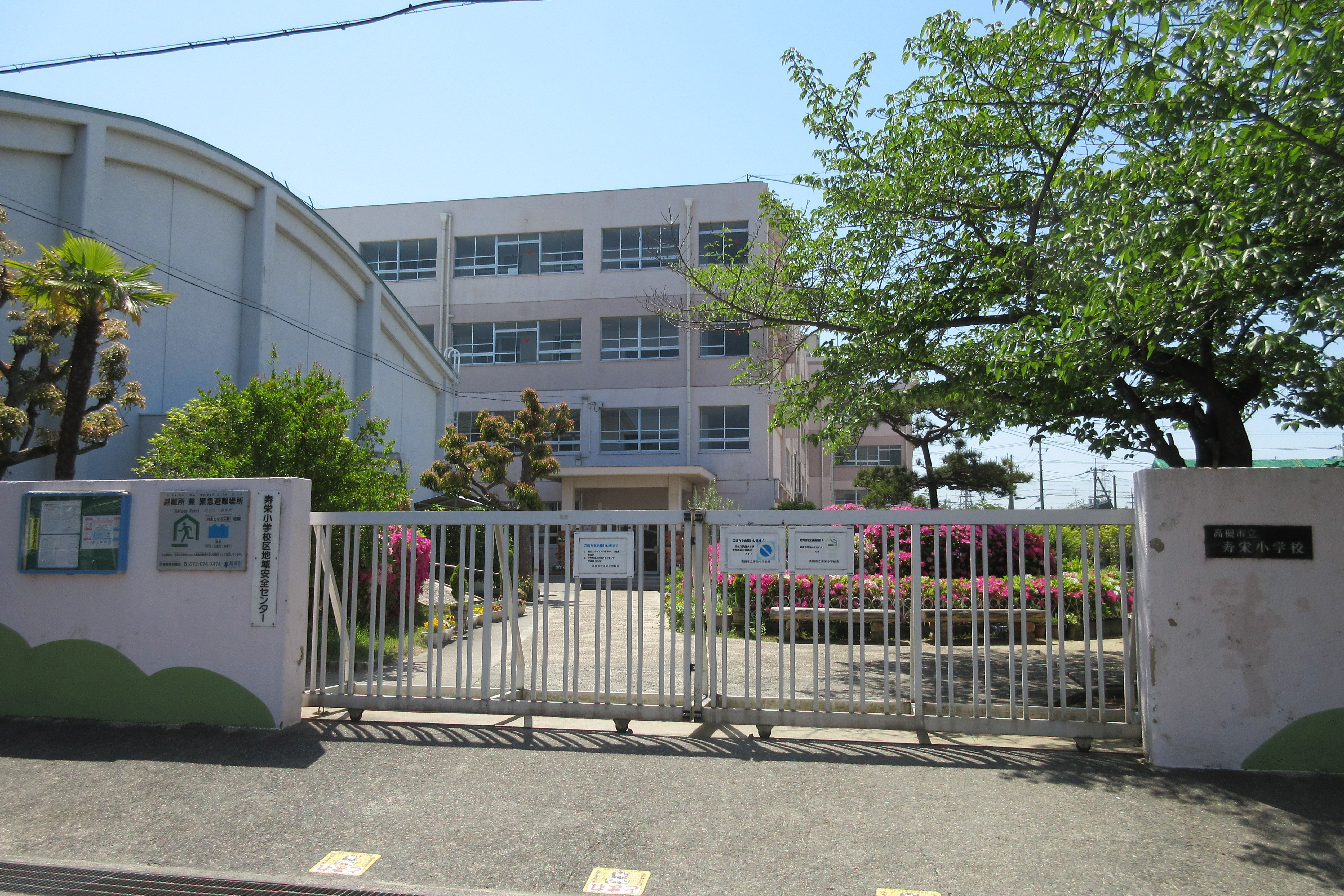 高槻市立寿栄小学校